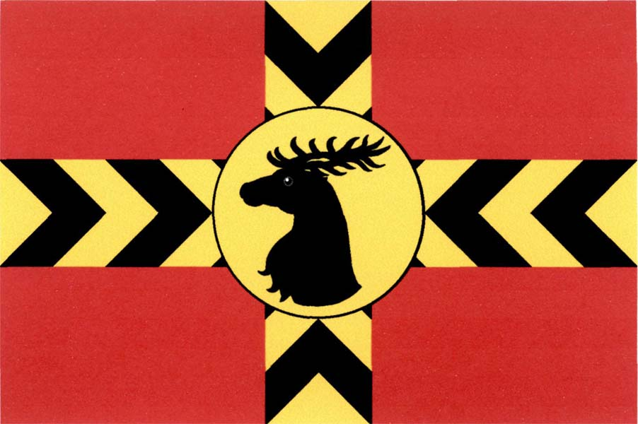 Vlajka obce Červené Pečky